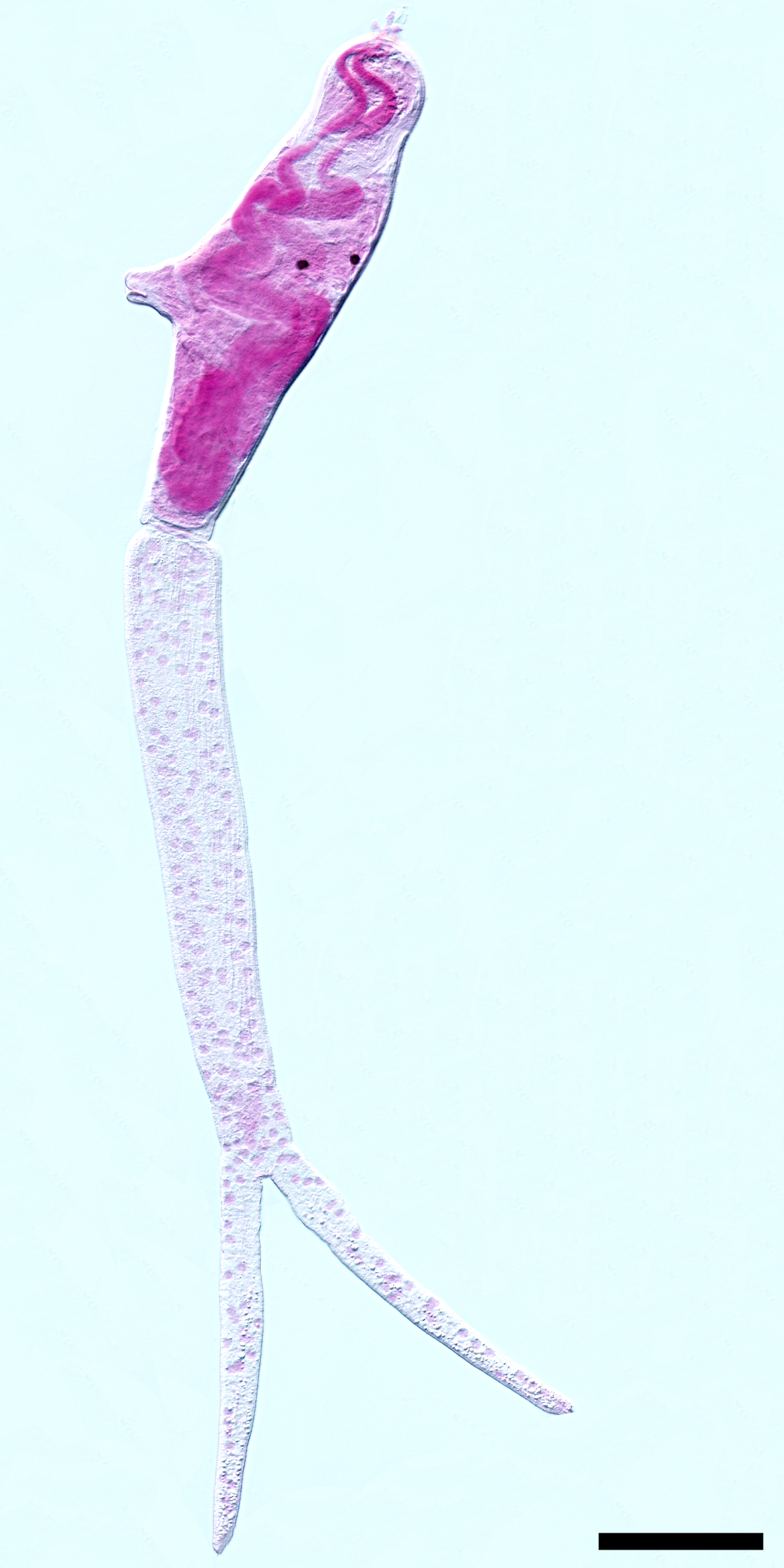 Cerkárie ptačí motolice Trichobilharzia szidati (Schistosomatidae), původce cerkáriové dermatitidy. V přední části těla jsou patrné růžově obarvené postacetabulární penetrační žlázy a jejich vývody. Fixováno 70% etanolem, barveno lithium karmínem. Měřítko: 100 um.